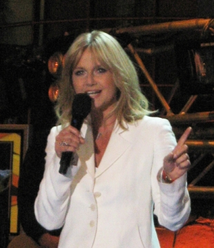 Koncert inaugurujący jesienną ramówkę TVP (Warszawa, ul. Woronicza): Grażyna Torbicka